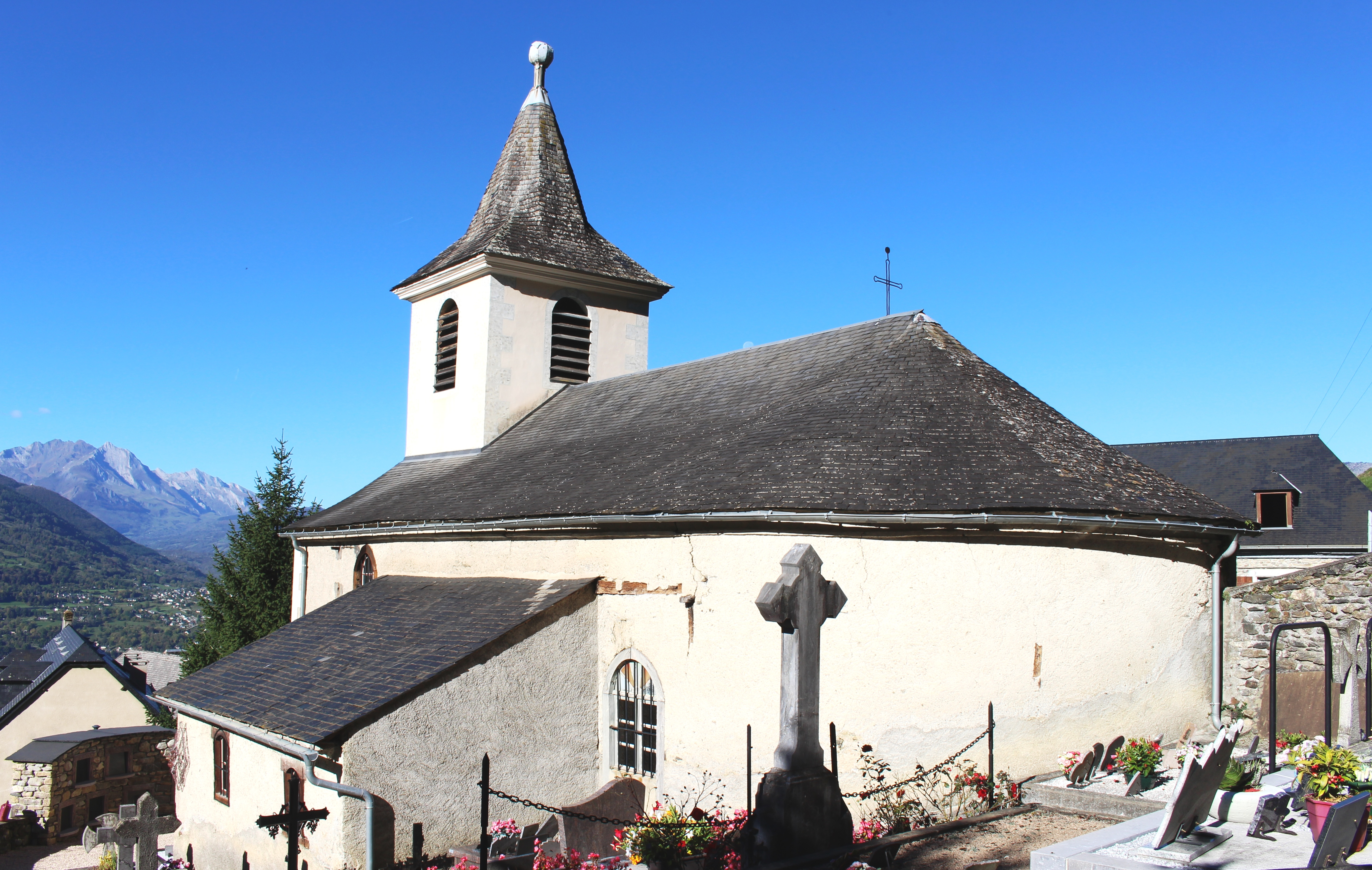 Église Saint-Laurent de Vier (Hautes-Pyrénées)